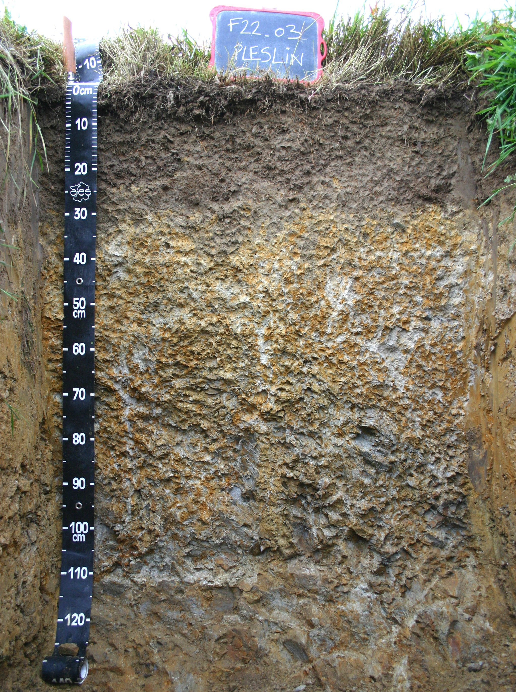 Rédoxisol